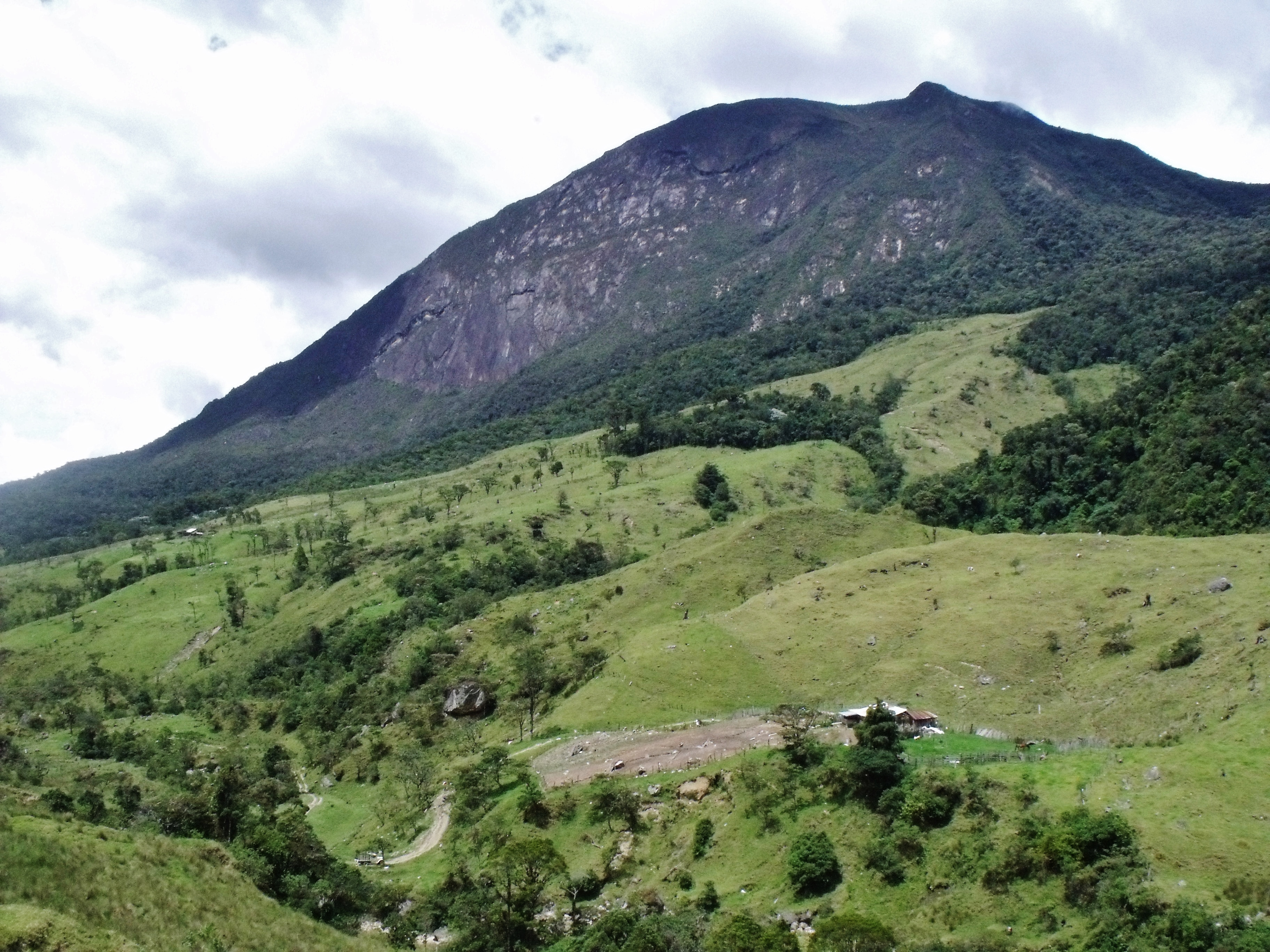 Cerro el Cobre en San Vicente de la Revancha. Parque nacional El Tamá.